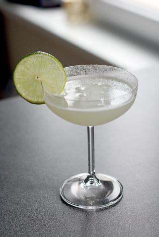 cocktail